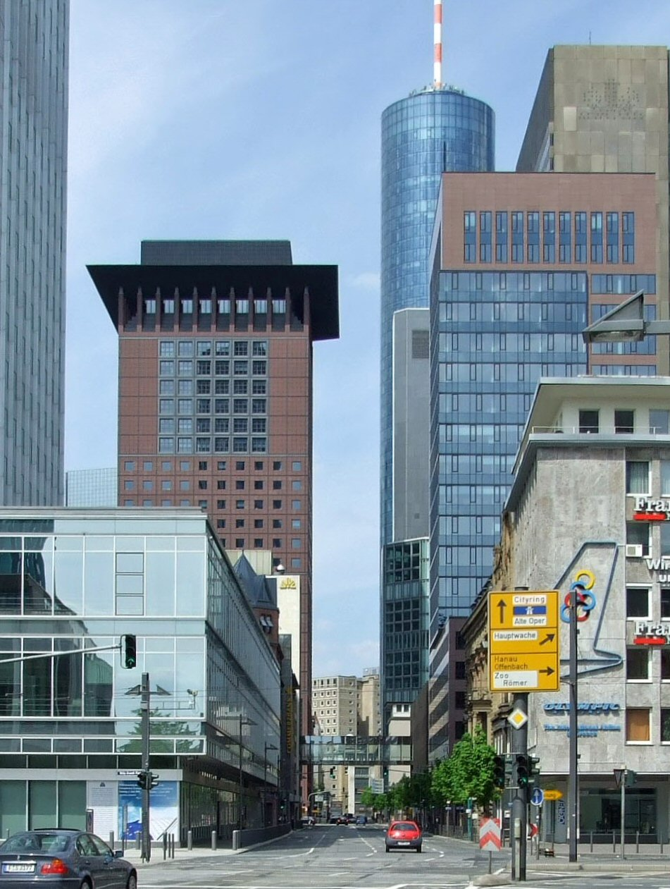 Bearbeitung des Bildes Image:Neue-mainzer-strasse-ffm001.jpg von User:Dontworry (Lizenz cc-by-sa-3.0)